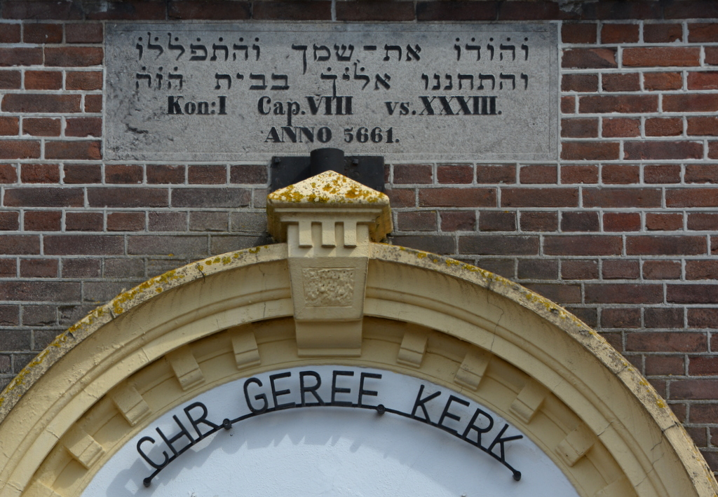 Assen, Kristlike-griff. Betheltsjerke, gevelstien